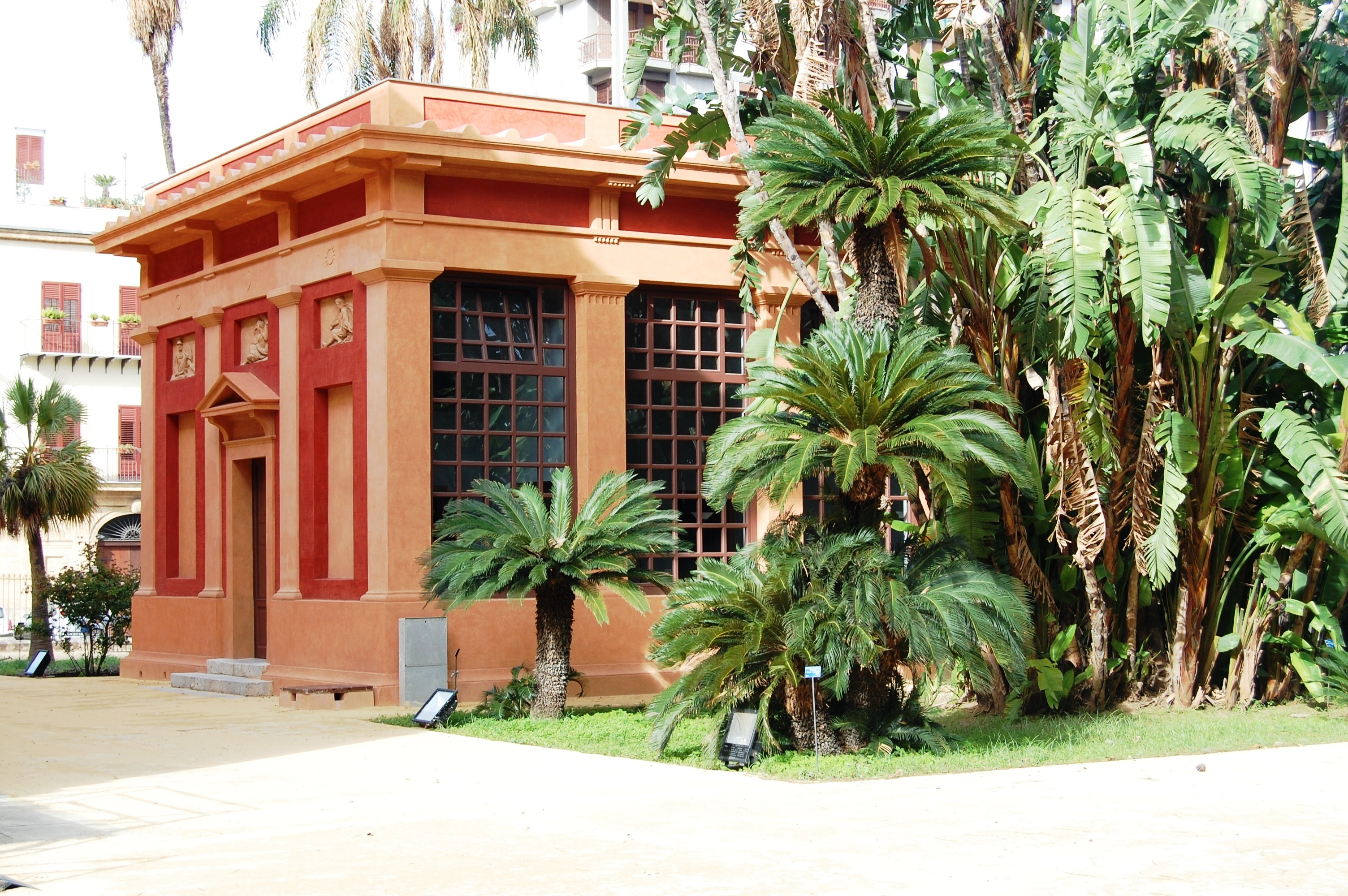 Orto botanico di Palermo - Tepidarium